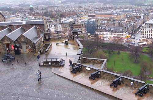 Edinburgh Castle (Scotland), Argyle Battery and One O'Clock Gun